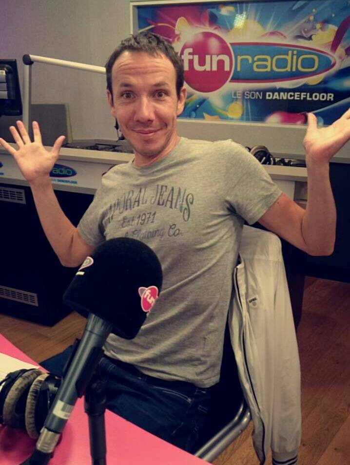 Karel lors de l'émission Lovin'Fun